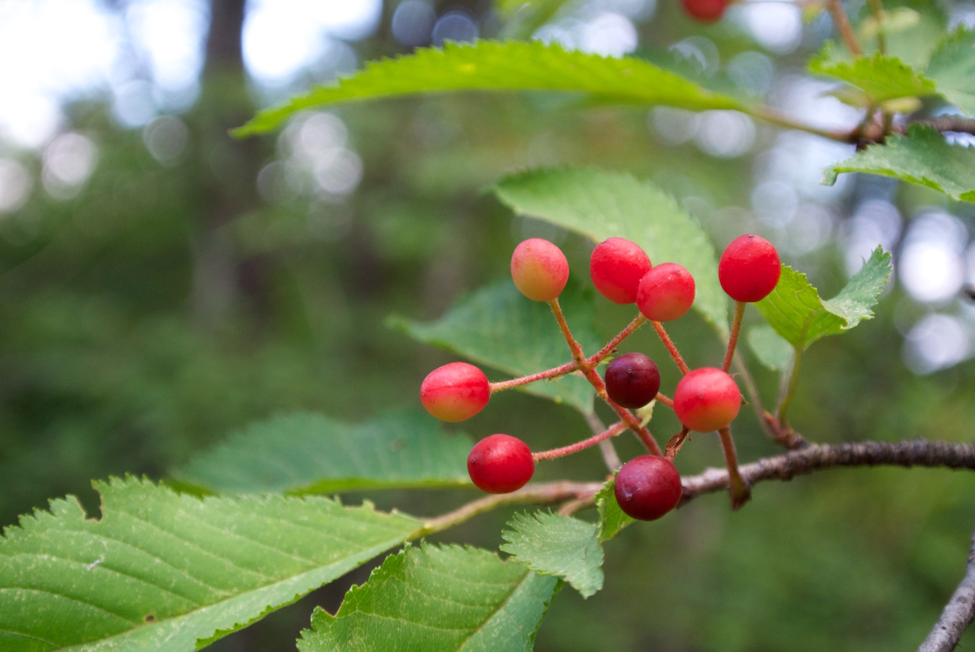 w/ Nikon 1 V1 +10-30mm